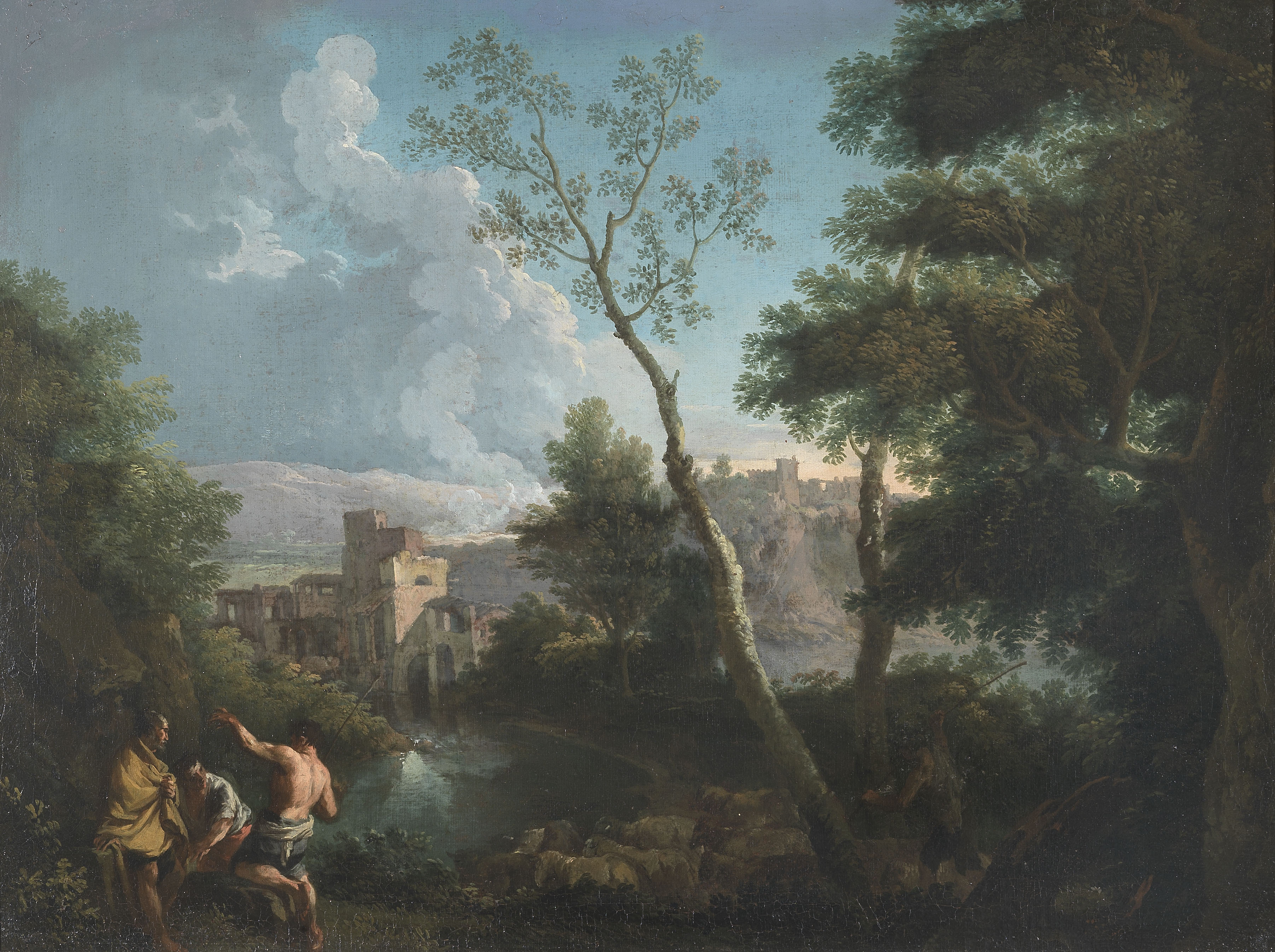 Paesaggio con pastori lungo un corso d’acqua Olio su tela 54 x 72 cm, Collezione Mainetti (Roma)